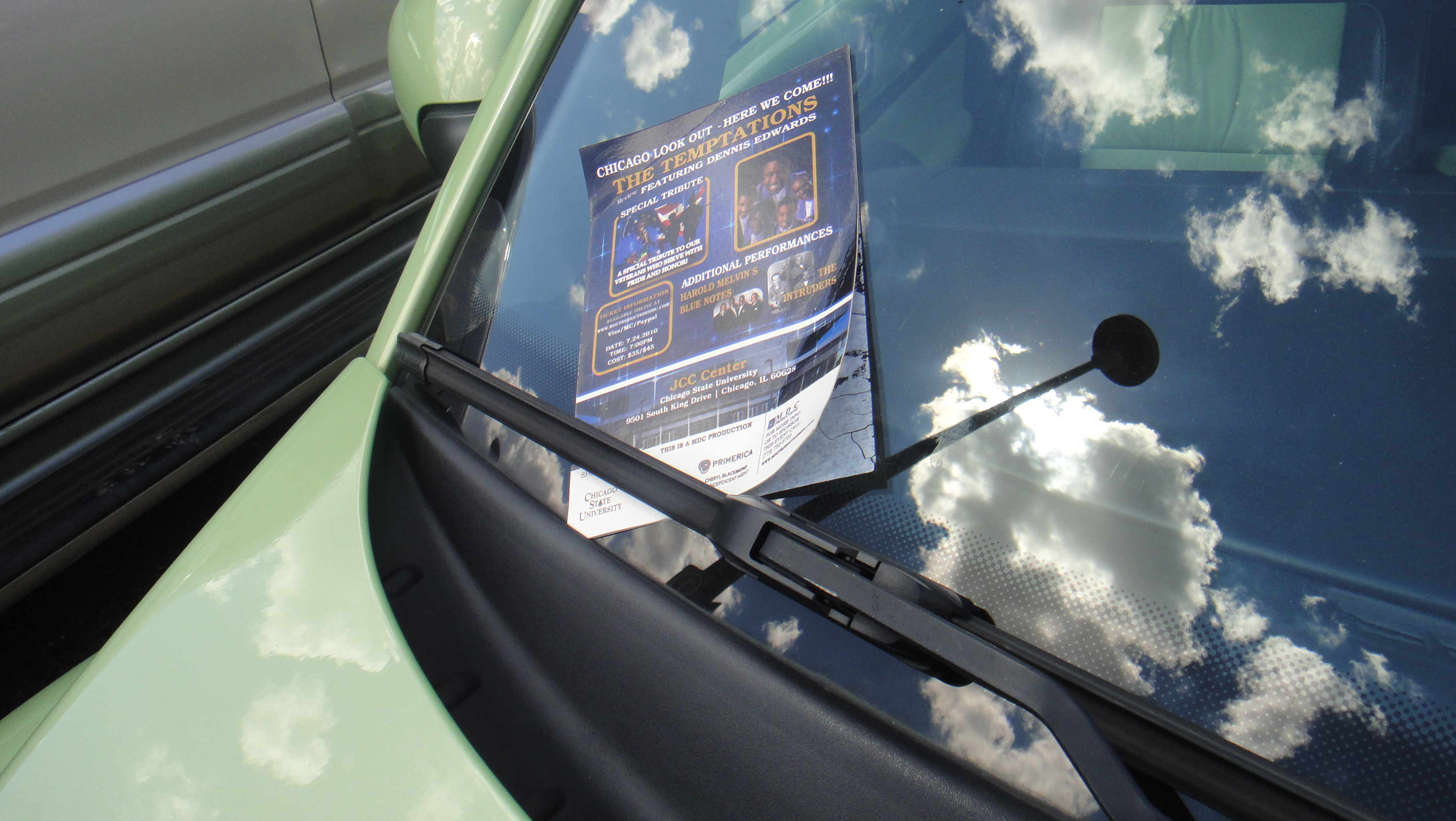 Folleto publicitario en el parabrisas de un coche